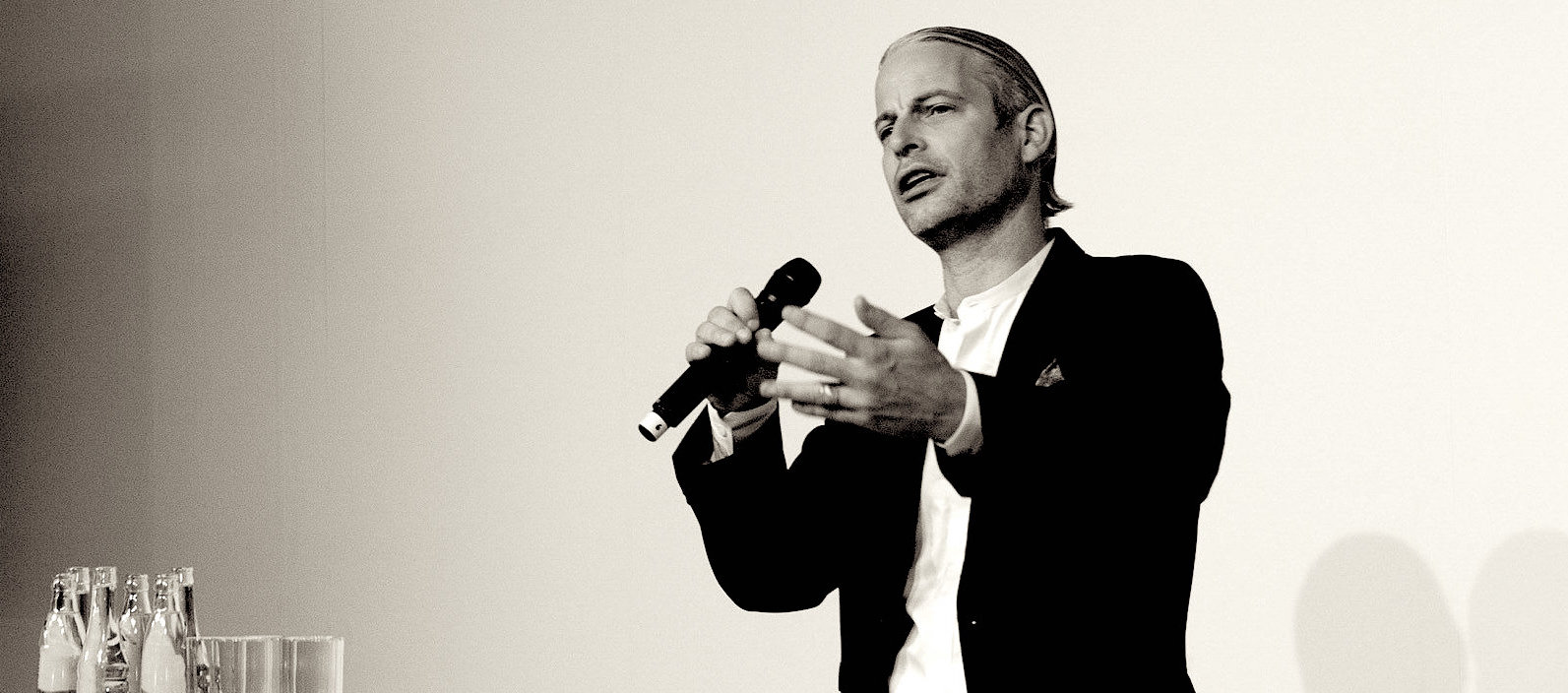 Lecture Ecostyle 2014